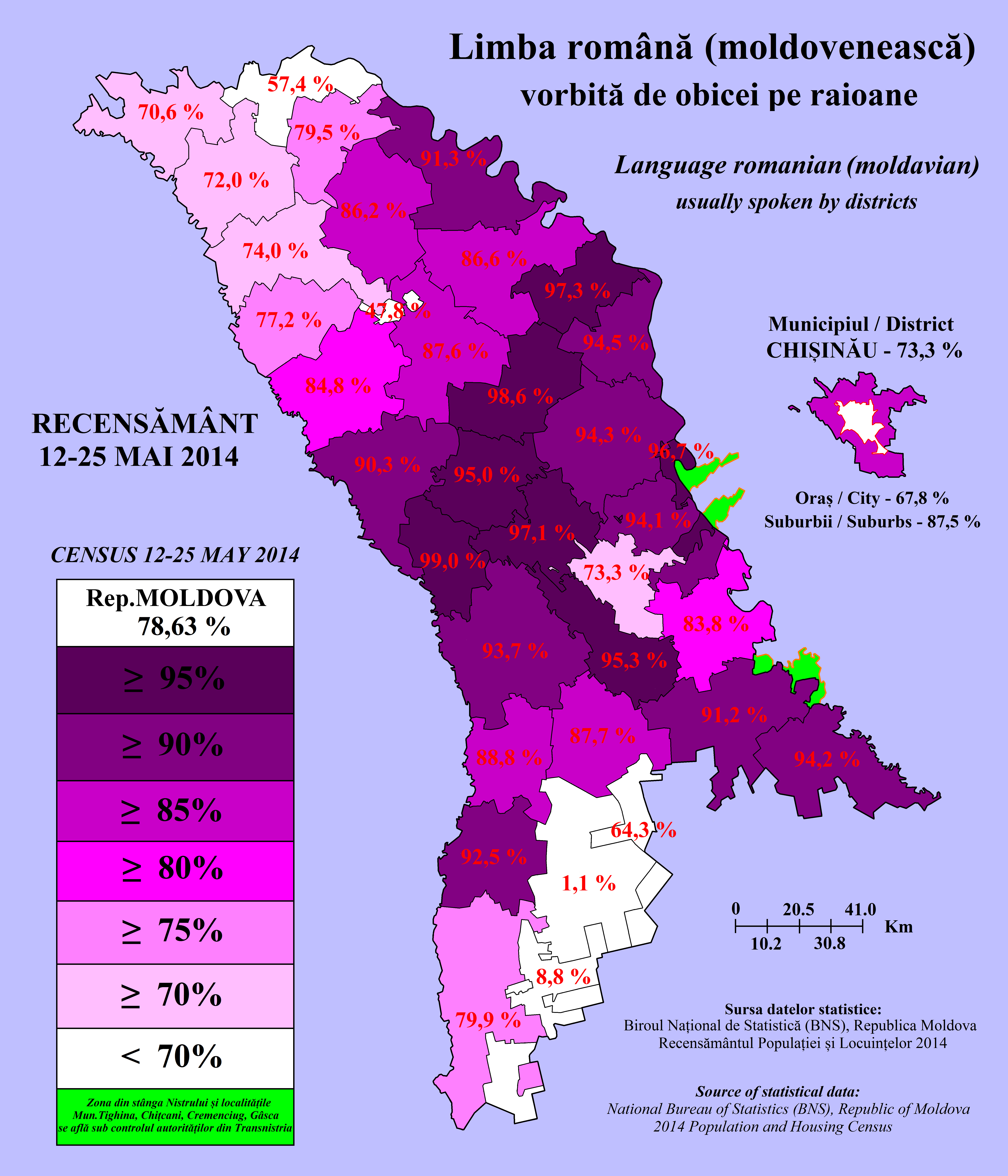 Limba română/moldovenească vorbită de obicei pe raioane în Rep.Moldova (2014)